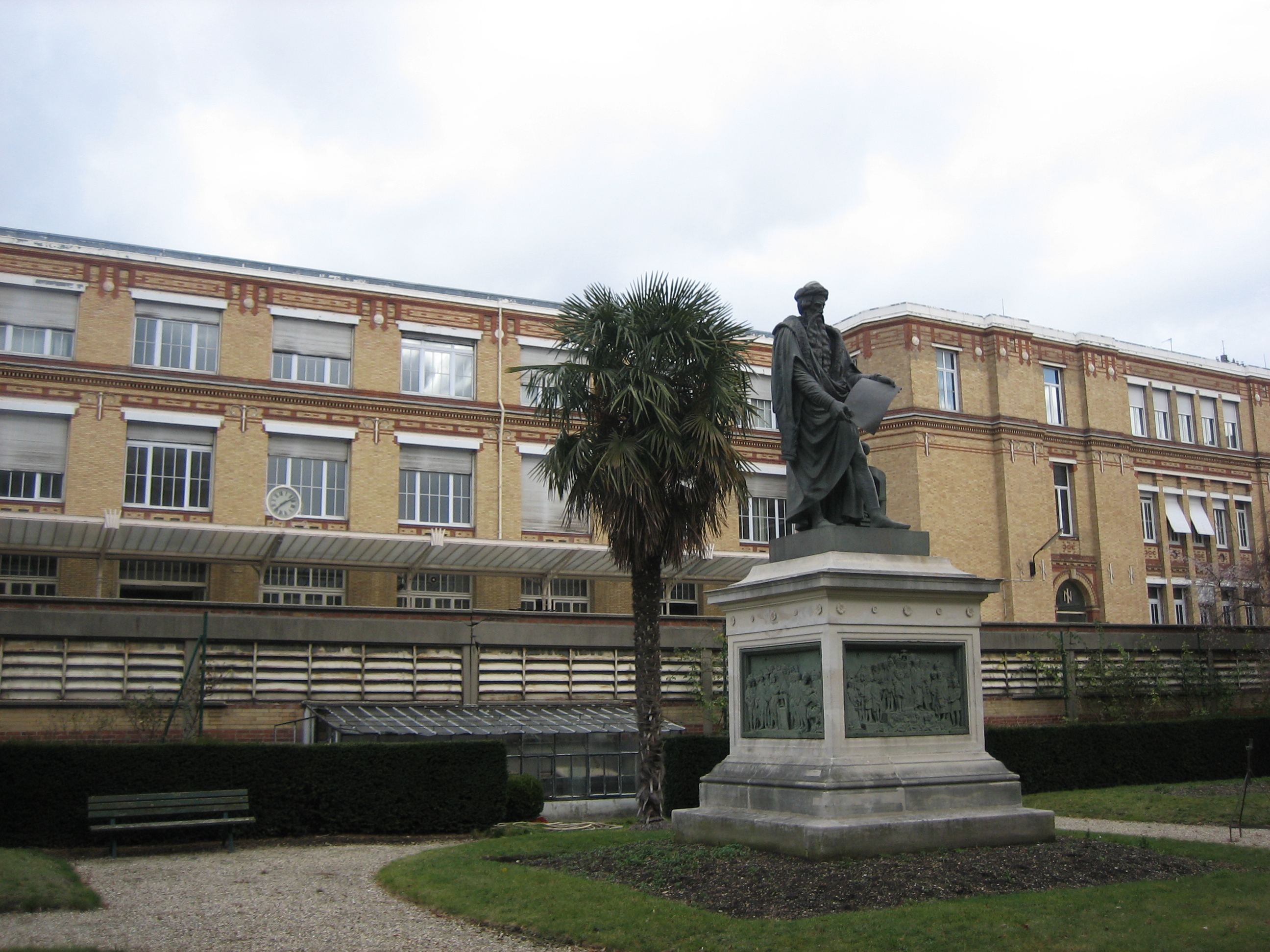 Le site de Paris de l'Imprimerie Nationale Adresse: 27, rue de la Convention - 75015 Paris Pour s'y rendre: -Métro 10 'Javel - André Citroën' -RER C 'Javel'